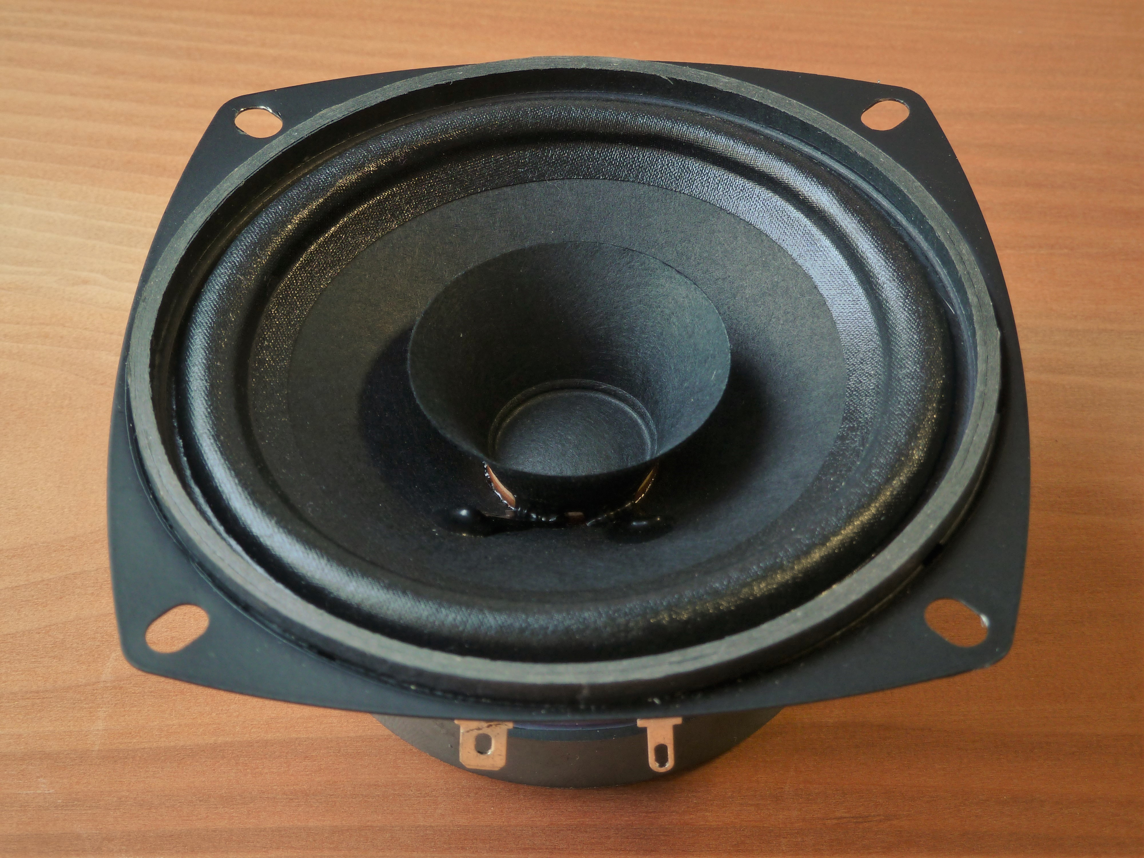 Visatonの10cmフルレンジスピーカーユニット・FR10